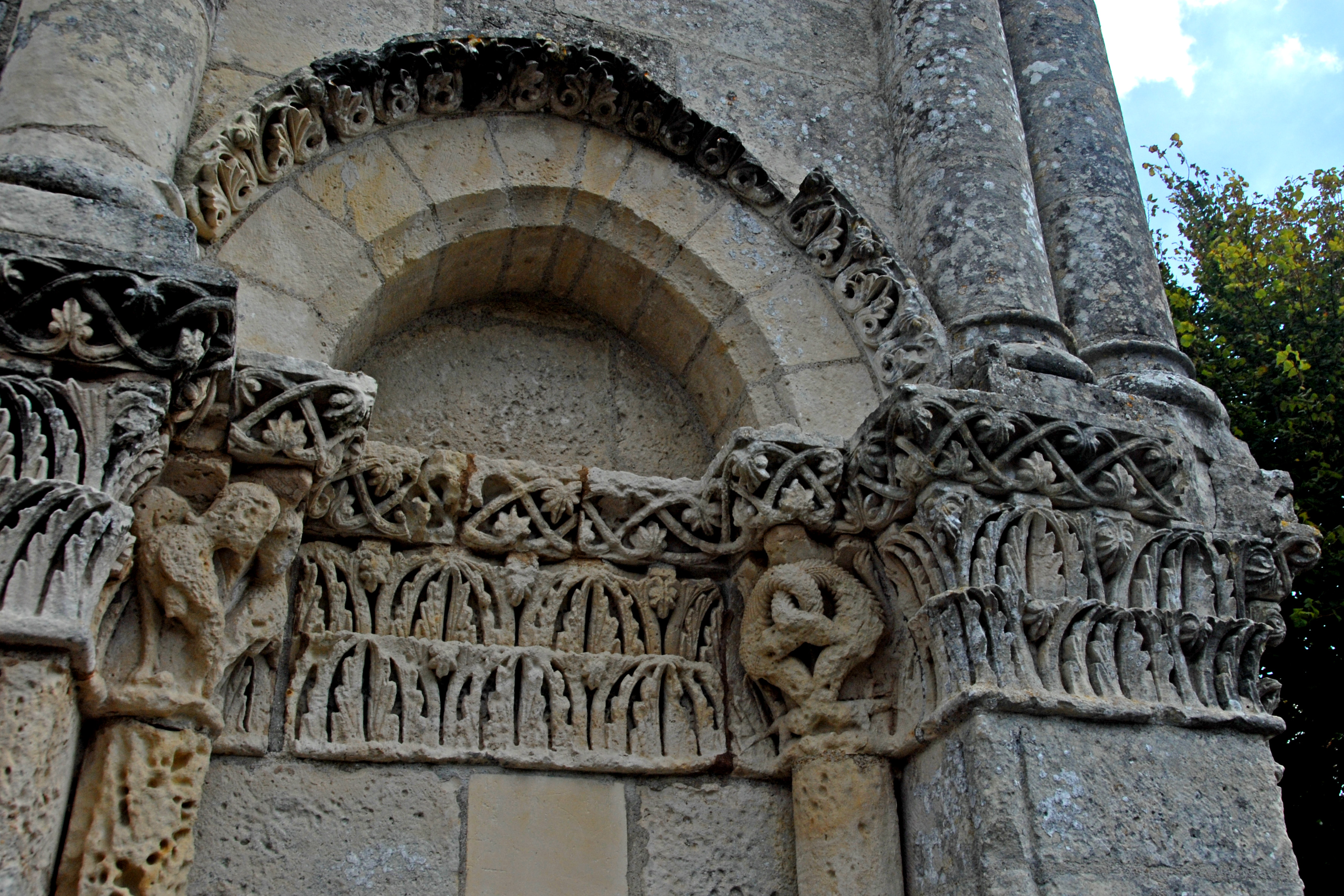 Echebrune, St.-Pierre, Blindportal rechts